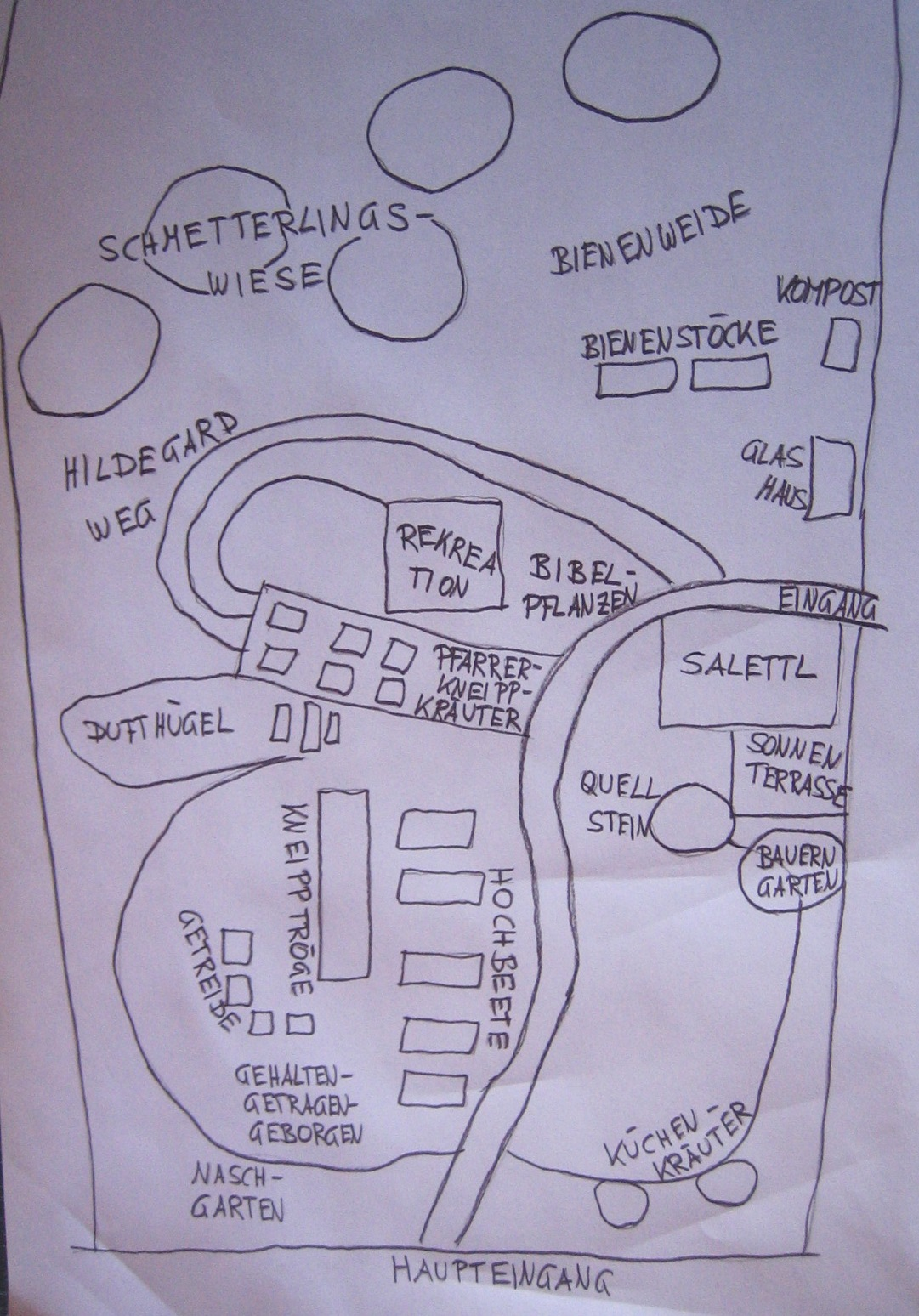 Skizze Überblick Kräutergarten Bad Mühllacken